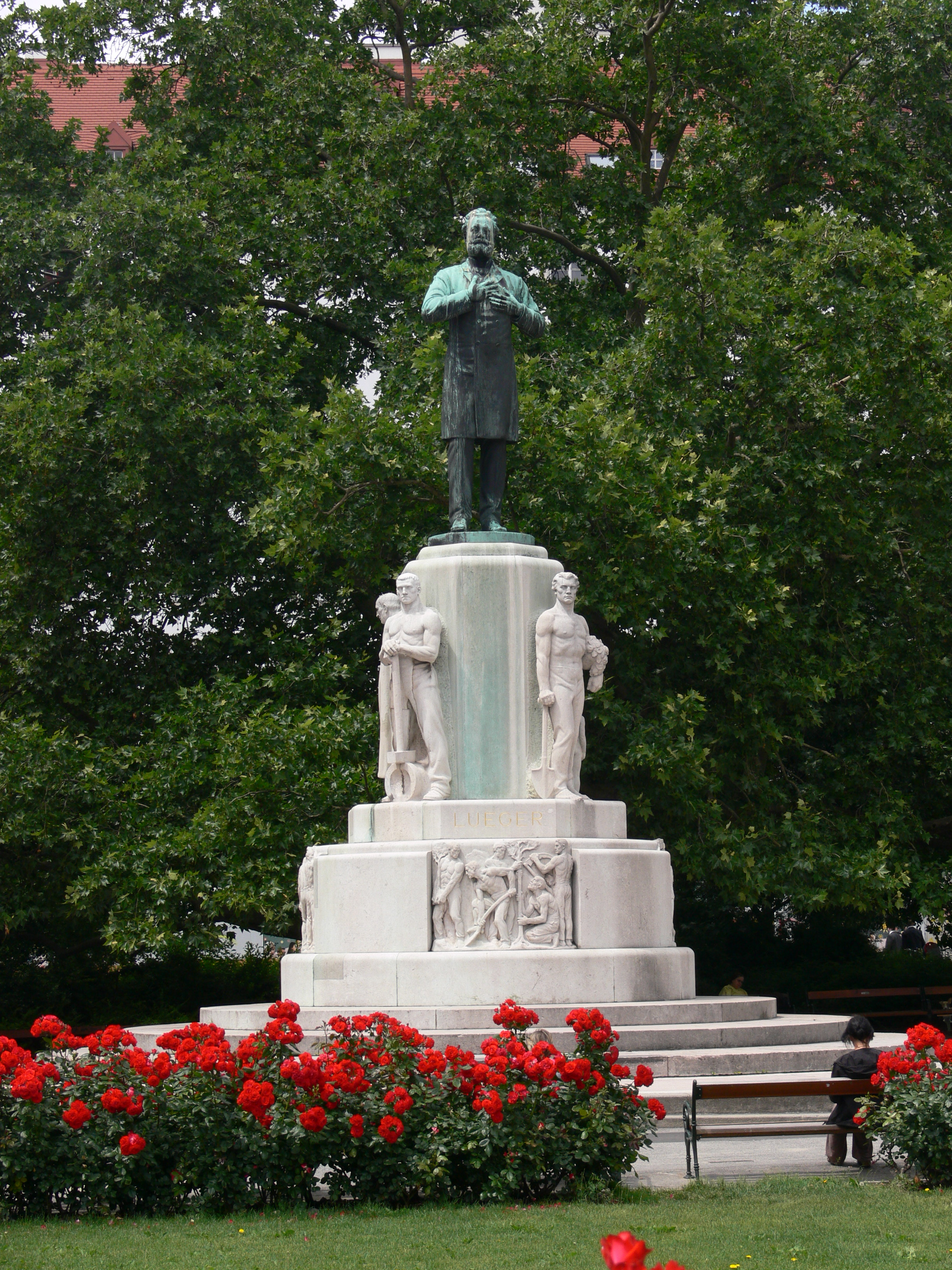 Wien, 1., Dr.-Karl-Lueger-Platz, Denkmal für Dr. Karl Lueger